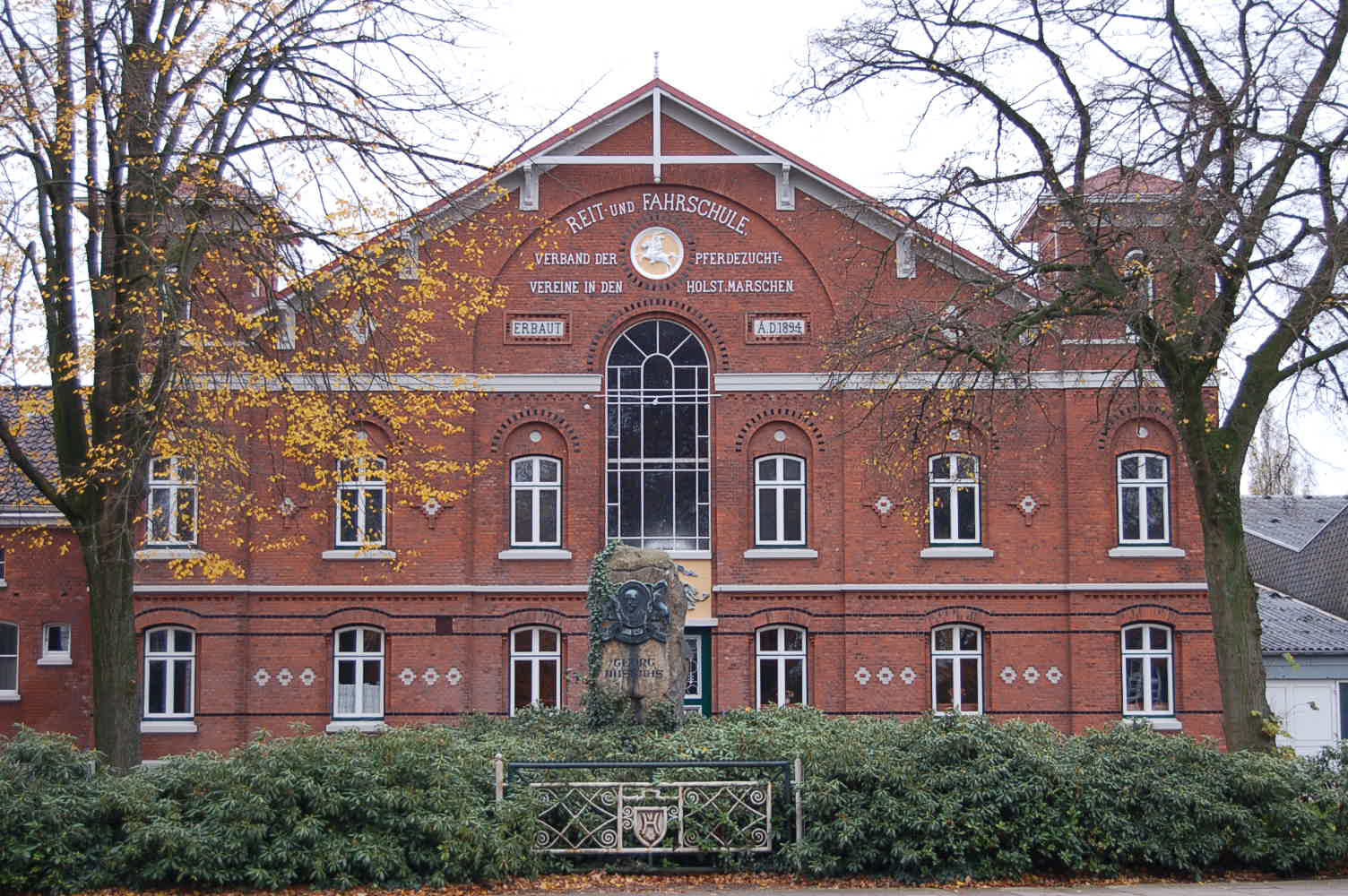 Westerstraße 93-99, Reit- und Fahrschule Elmshorn, Baujahr: 1894 This is a photograph of an architectural monument.